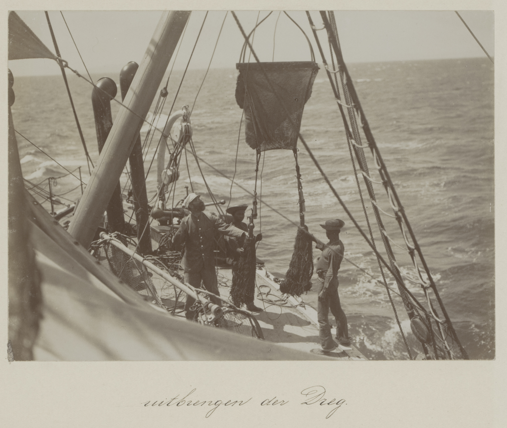 1899-1900, Siboga-expeditie naar Nederlands Oost-Indië, onder leiding van Max Wilhelm Carl Weber uitzetten van de dreg De dreg is voorzien van een paar dikke zwabbers, die over de grond slepende, fijne dieren in hun lange vezels kunnen vasthouden.